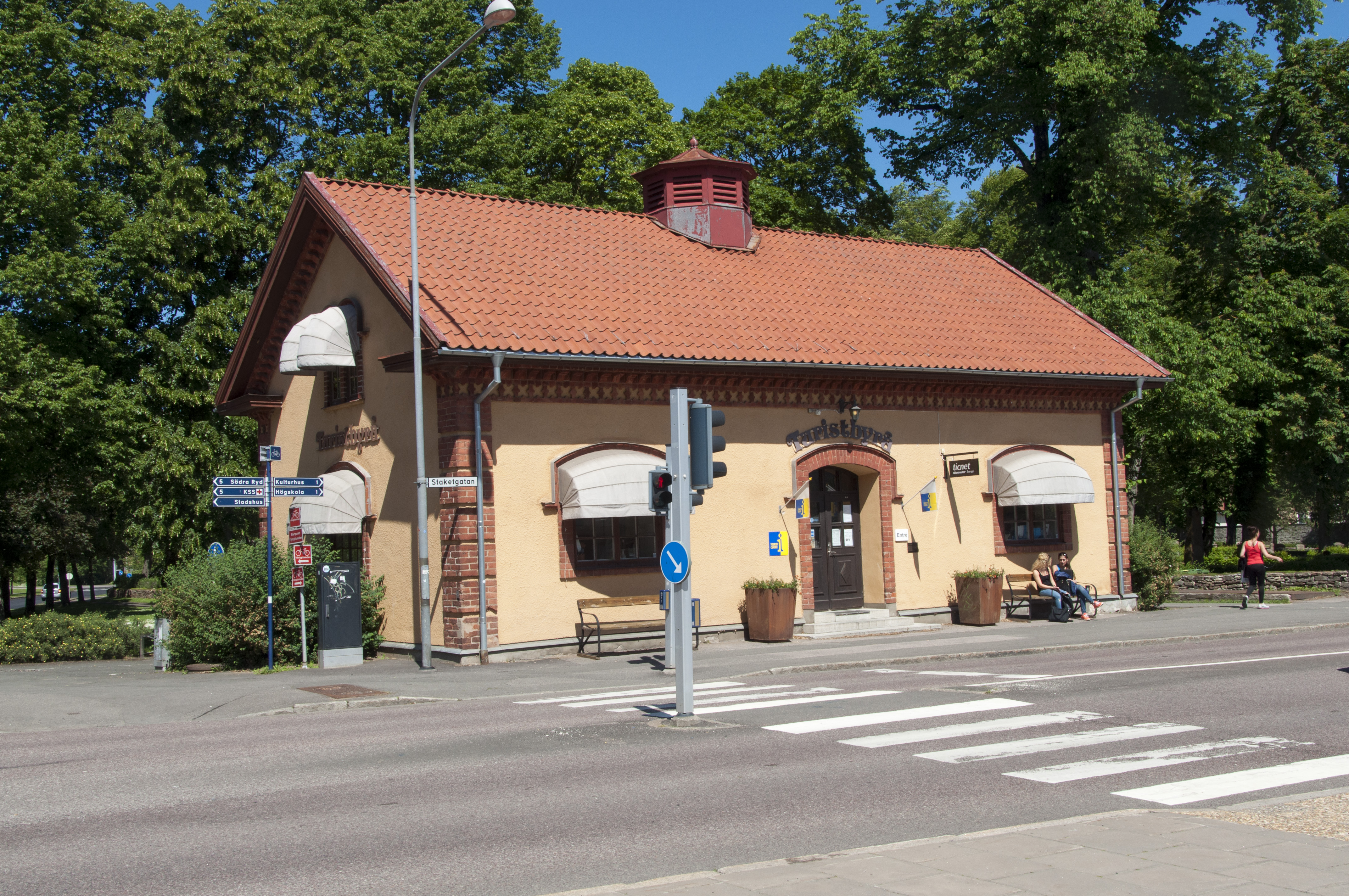 Turistbyrån i Skövde. Ursprungligen spruthus uppfört 1863